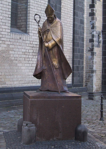 Das Kardinal-Frings-Denkmal vor dem Quirinus-Münster in Neuss/Rh.